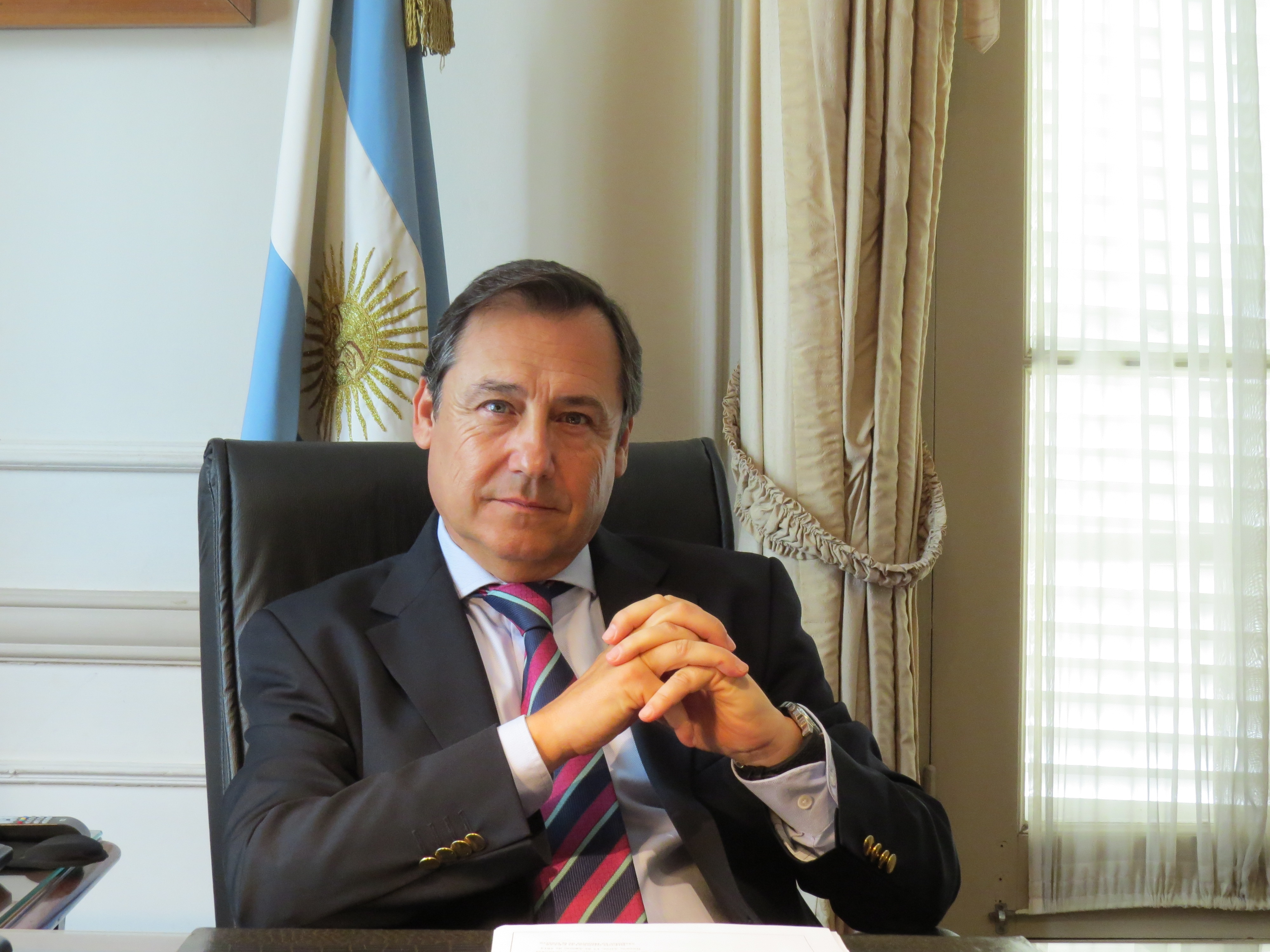 Político